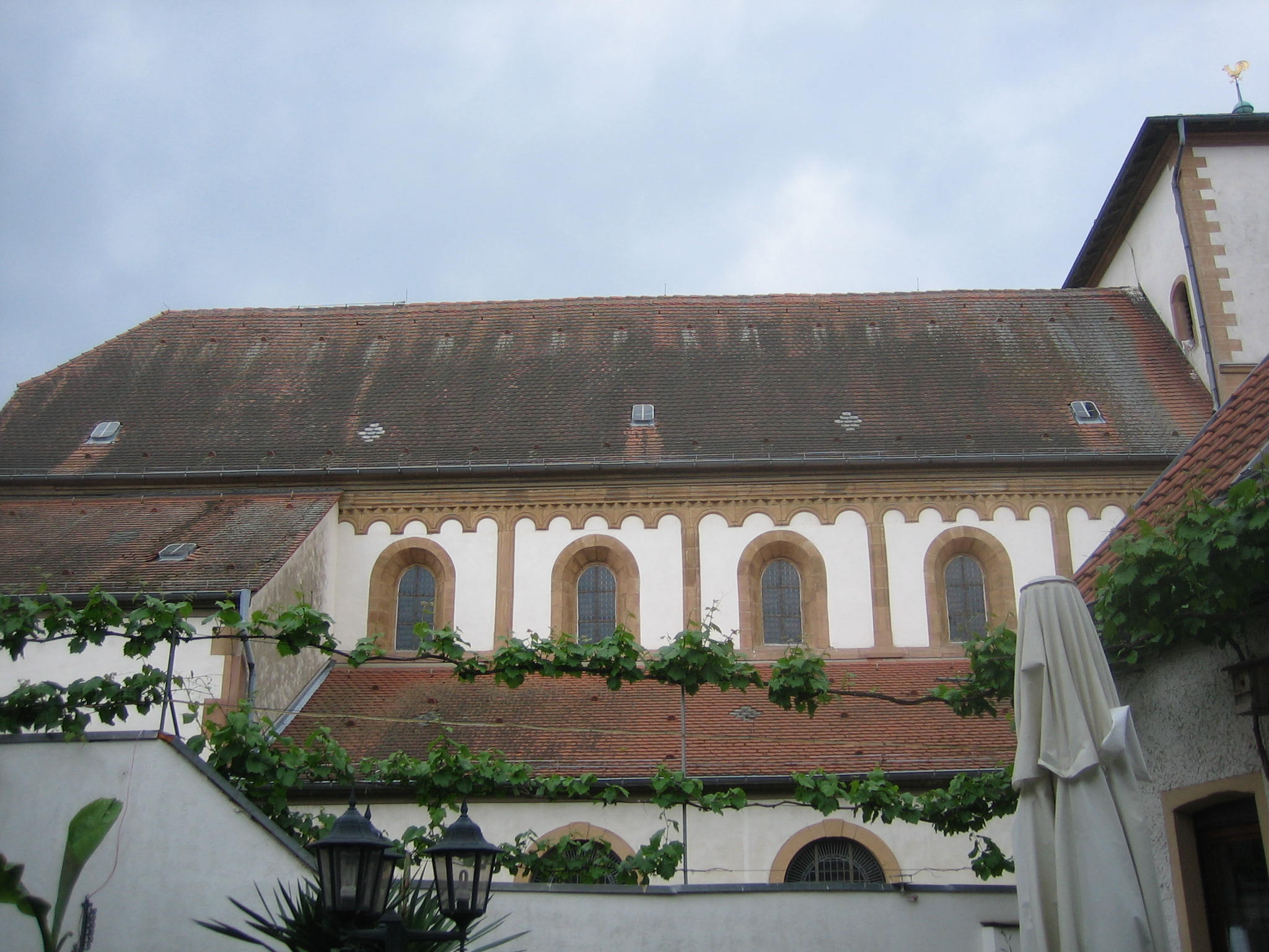 Basilika St. Lambert Langhaus; Nordseite